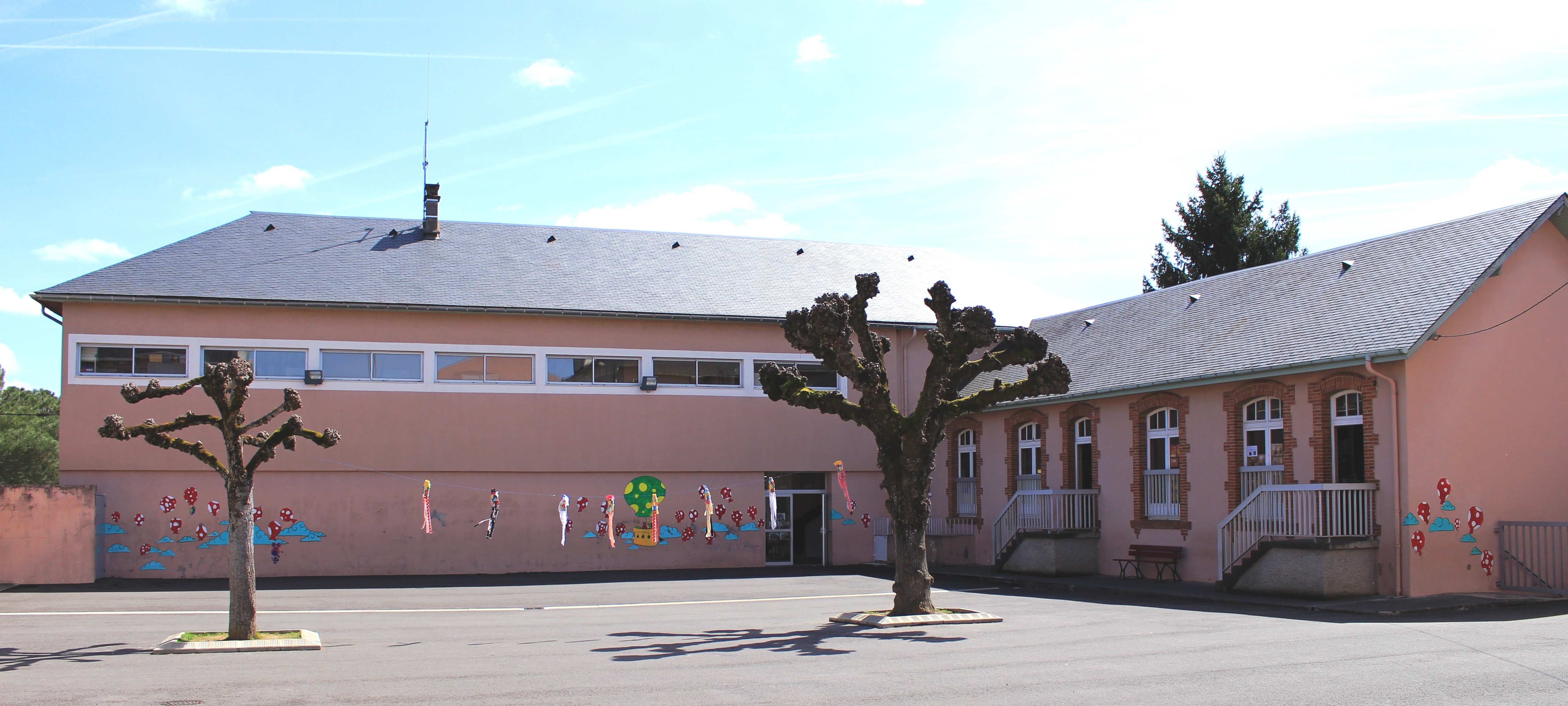 École de Galan (Hautes-Pyrénées)